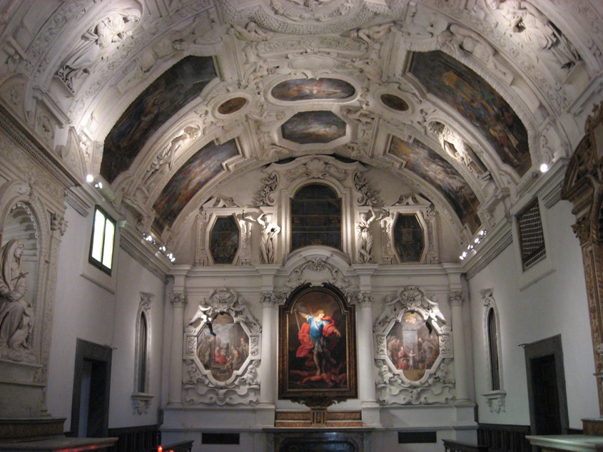 Intérieur de l'église saint Joseph de Cagli, Marches , Italie